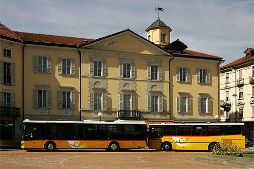 Piazza Indipendenza in Bellinzona